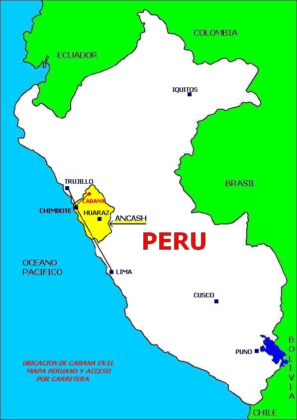 Ubicación en el mapa peruano del distrito de Cabana, en la Región Ancash